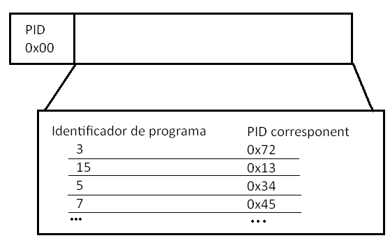 PAT d'un MPEG-2TS